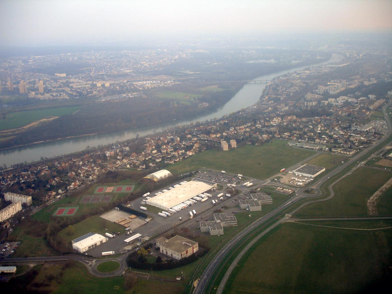 Vue aérienne d'Athis-Mons (Essonne)